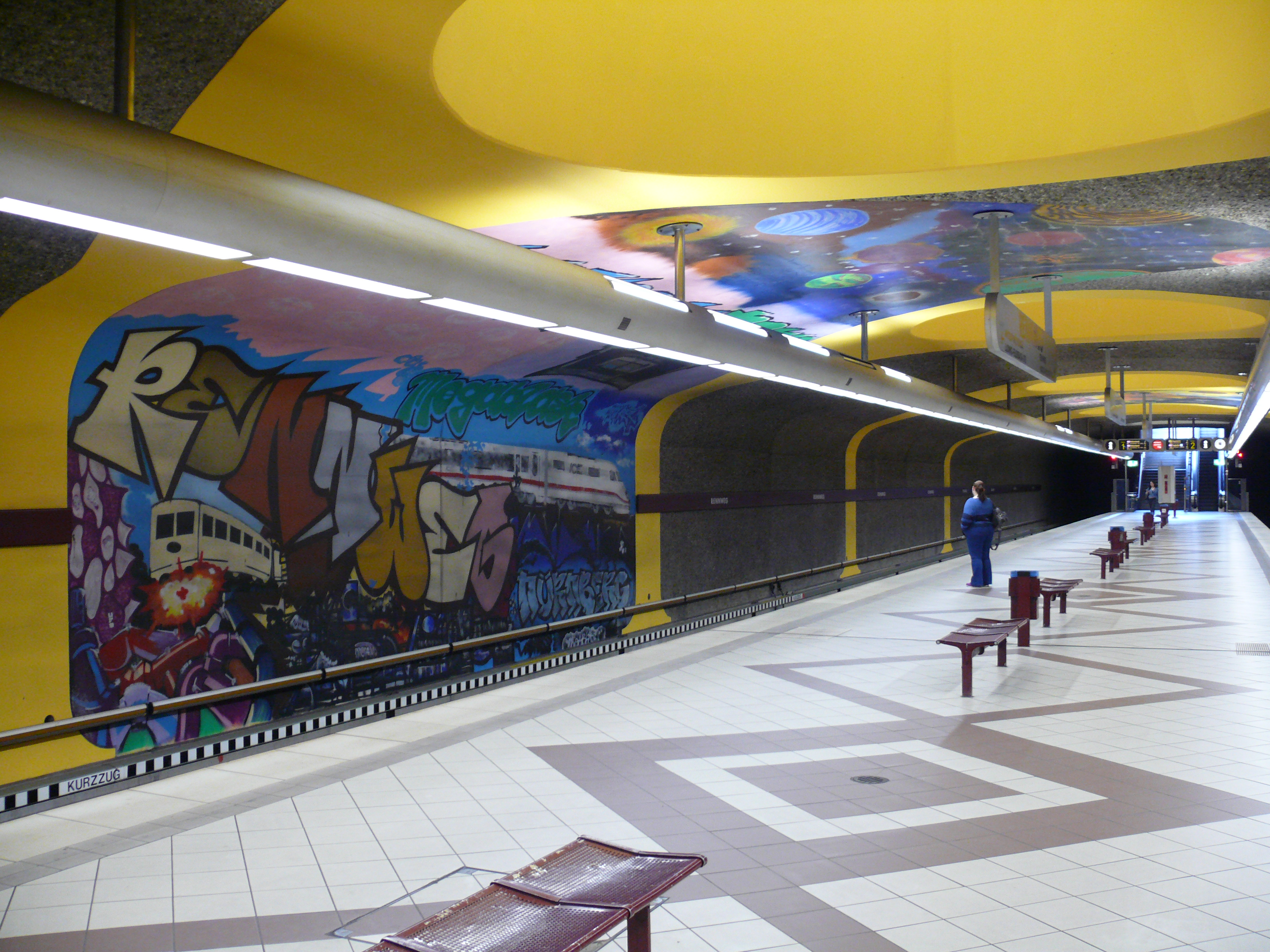 Gestaltung an der Wand und an der Decke am U-Bahnhof Rennweg in Nürnberg.